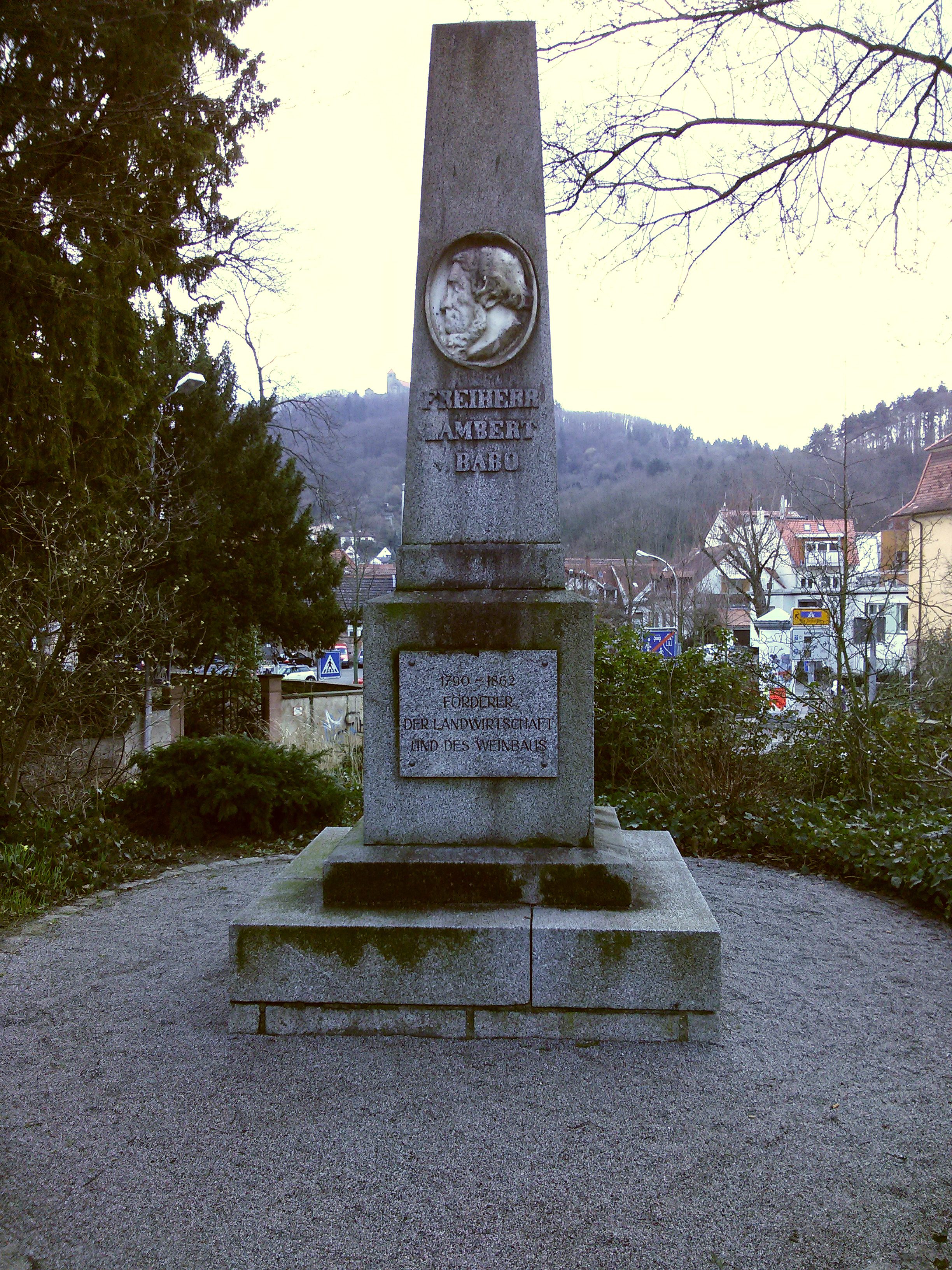 Denkmal Freiher Lambert von Babo (1790 - 1862) in Weinheim a. d. Bergstraße, Deutschland. Förderer der Landwirtschaft und des Weinbaus.